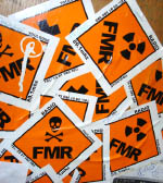 Autocollants du logo de Radio FMR, Toulouse. Auteur : moi-même. Photo prise sur un téléphone. Aussi dispo sur licence CC: By